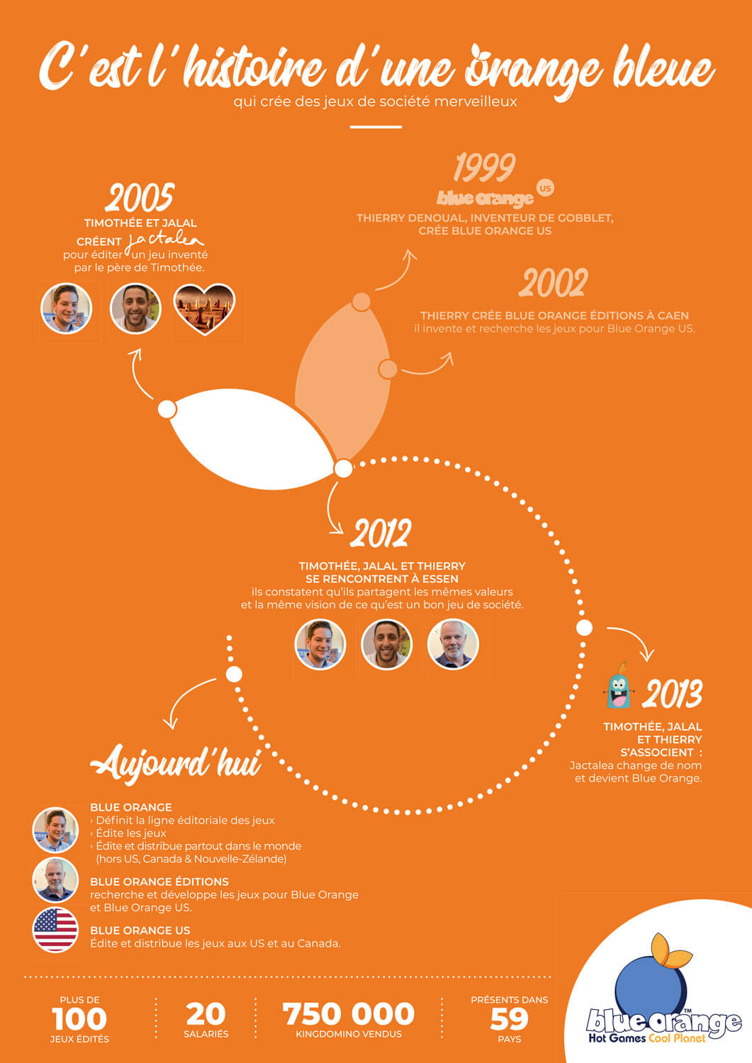 Il s'agit de l'infographie Publiée par Blue Orange pour illustrer son histoire